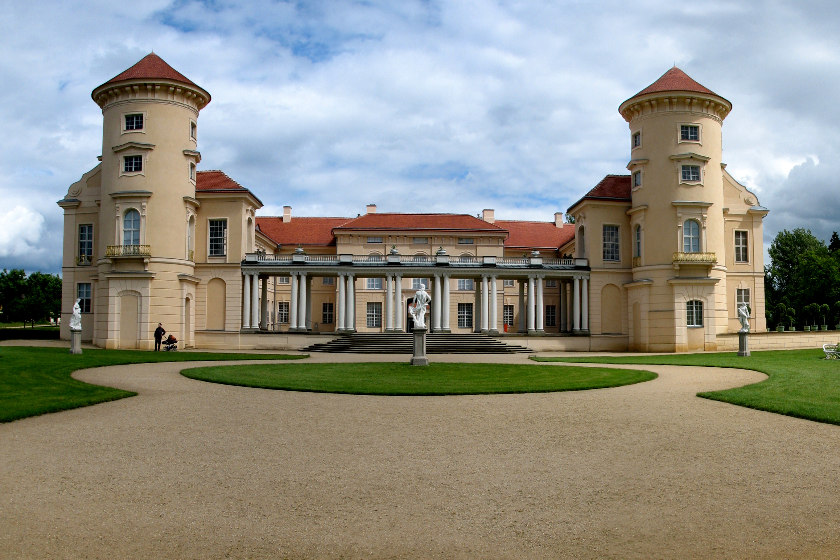 Schloss Rheinsberg, Stiftung Preußische Schlösser und Gärten Berlin-Brandenburg (SPSG)